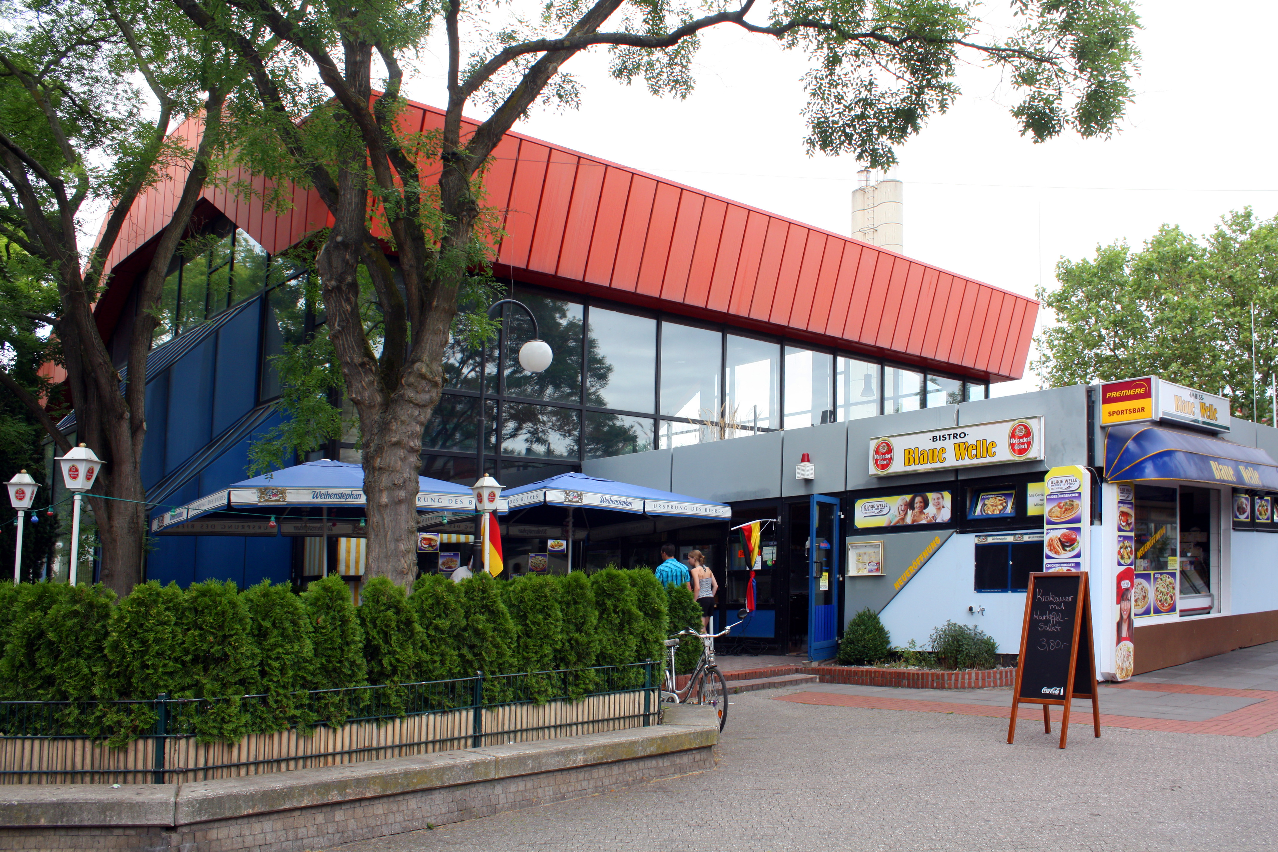 Erftstadt, Schwimmbad Liblar